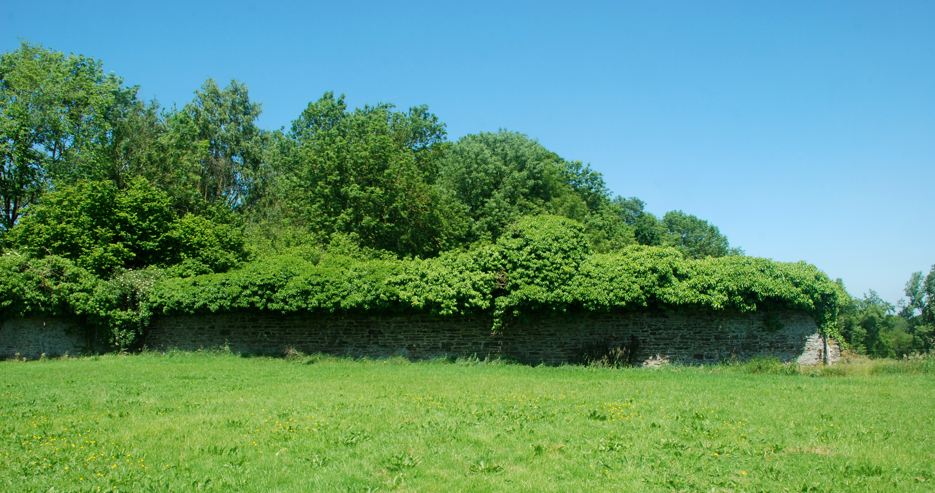 Belgique - Brabant wallon - Mur d'enceinte de l'abbaye de Villers-la-Ville - enceinte intérieure (sur le plateau agricole, côté ouest)